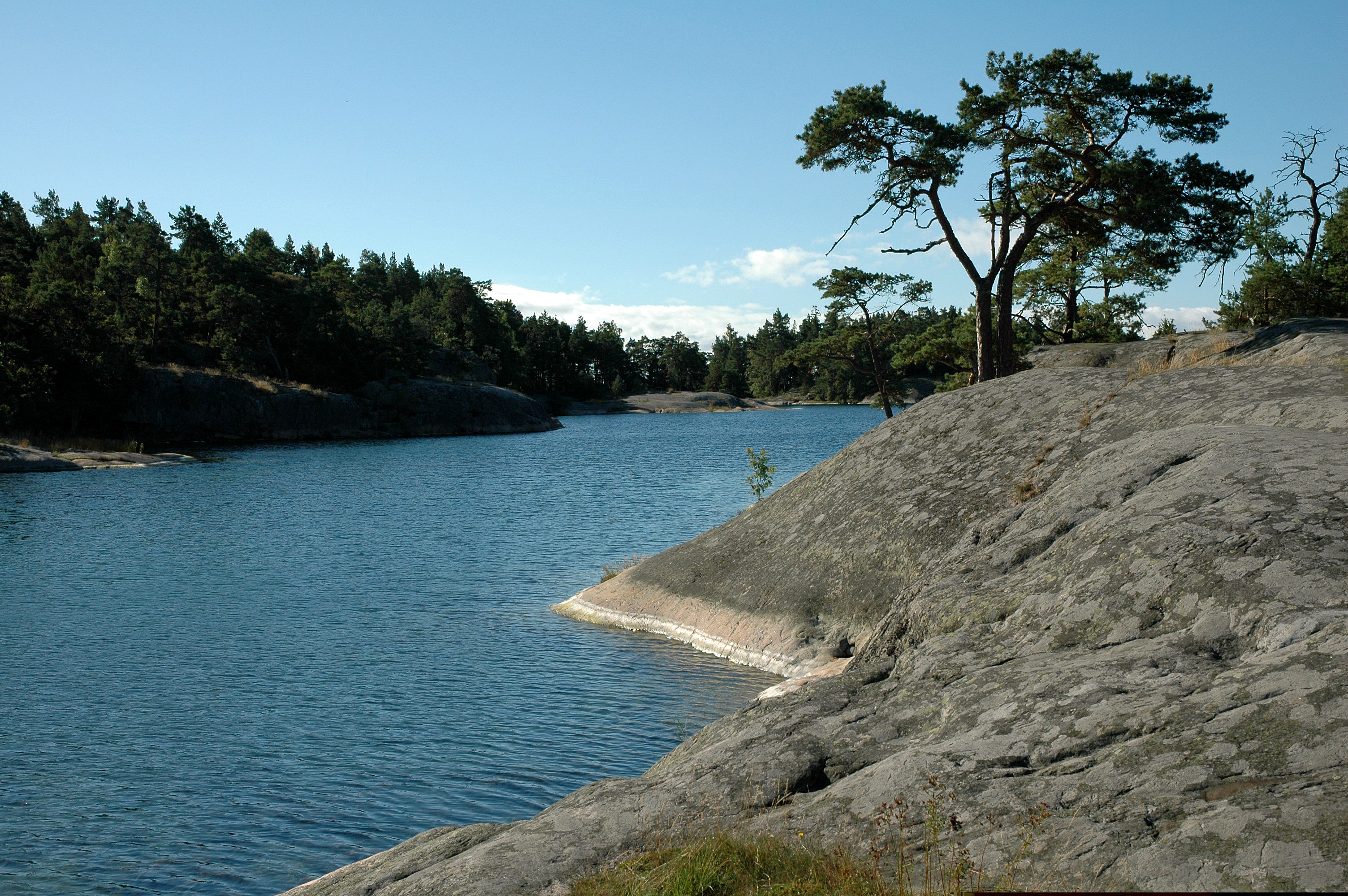 Stendörren